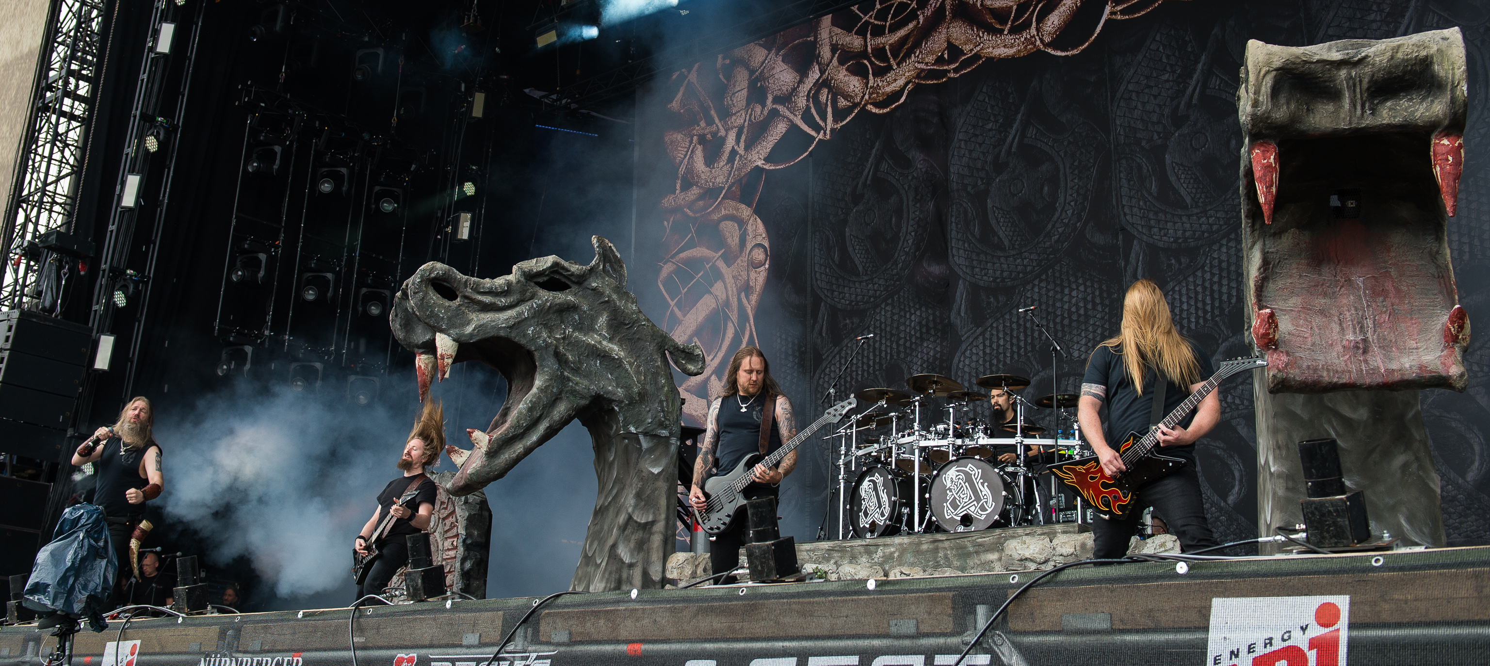 ARGO-Konzerte,Amon Amarth,Festival,Jocke Wallgren,Johan Hegg,Johan Söderberg,Konzert,Livekonzert,Livemusik,Musik,Olavi Mikkonen,RiP,Rock im Park 2016,Seat Zeppelin Stage,Ted Lundström